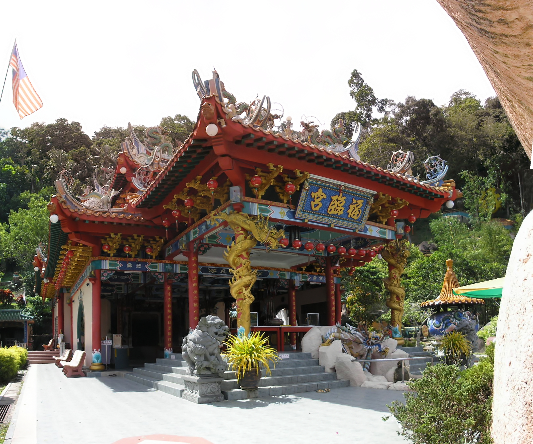 Fu King Long temple on Pangkor Island.